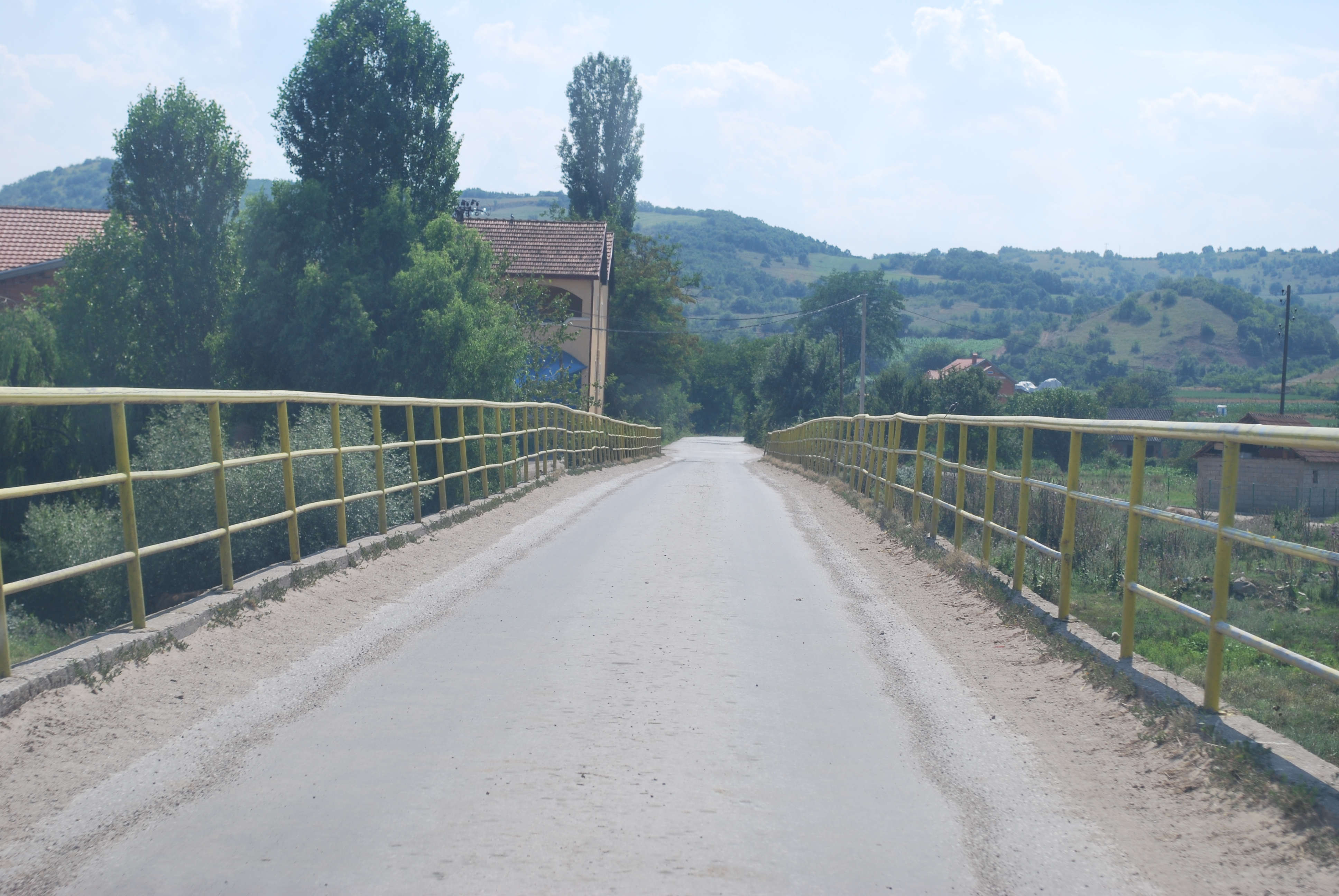 Dolno Konjari, Macedonia